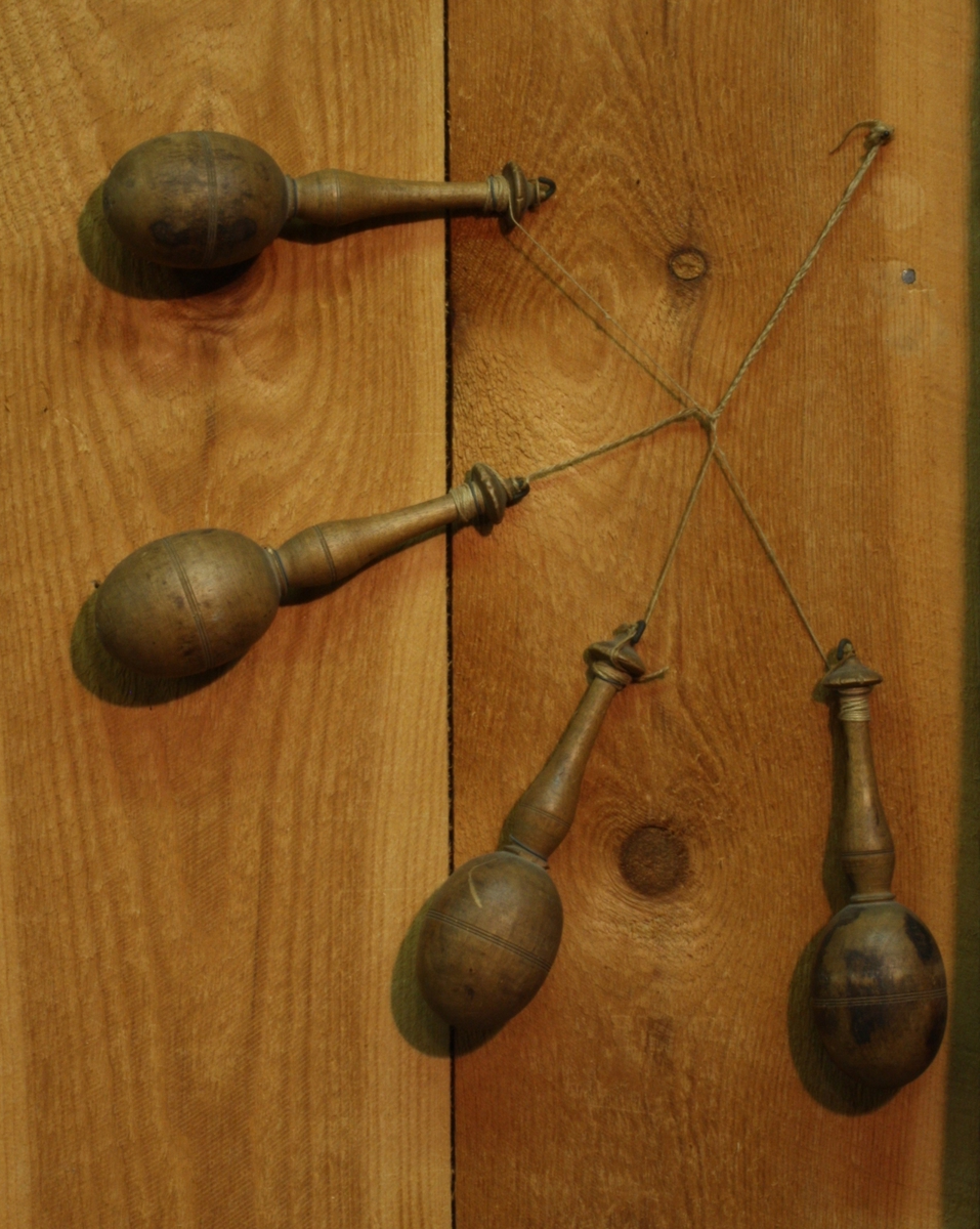 Forsynkroker, tradisjonelle redskaper brukt til fremstilling av fiskeliner, spesielt forsyn (=line fra rygglina ned til fiskekroken). Teknikk: Slingring. Redskapene ble også kalt garnsneller/slingrestokker/slyngestokker.